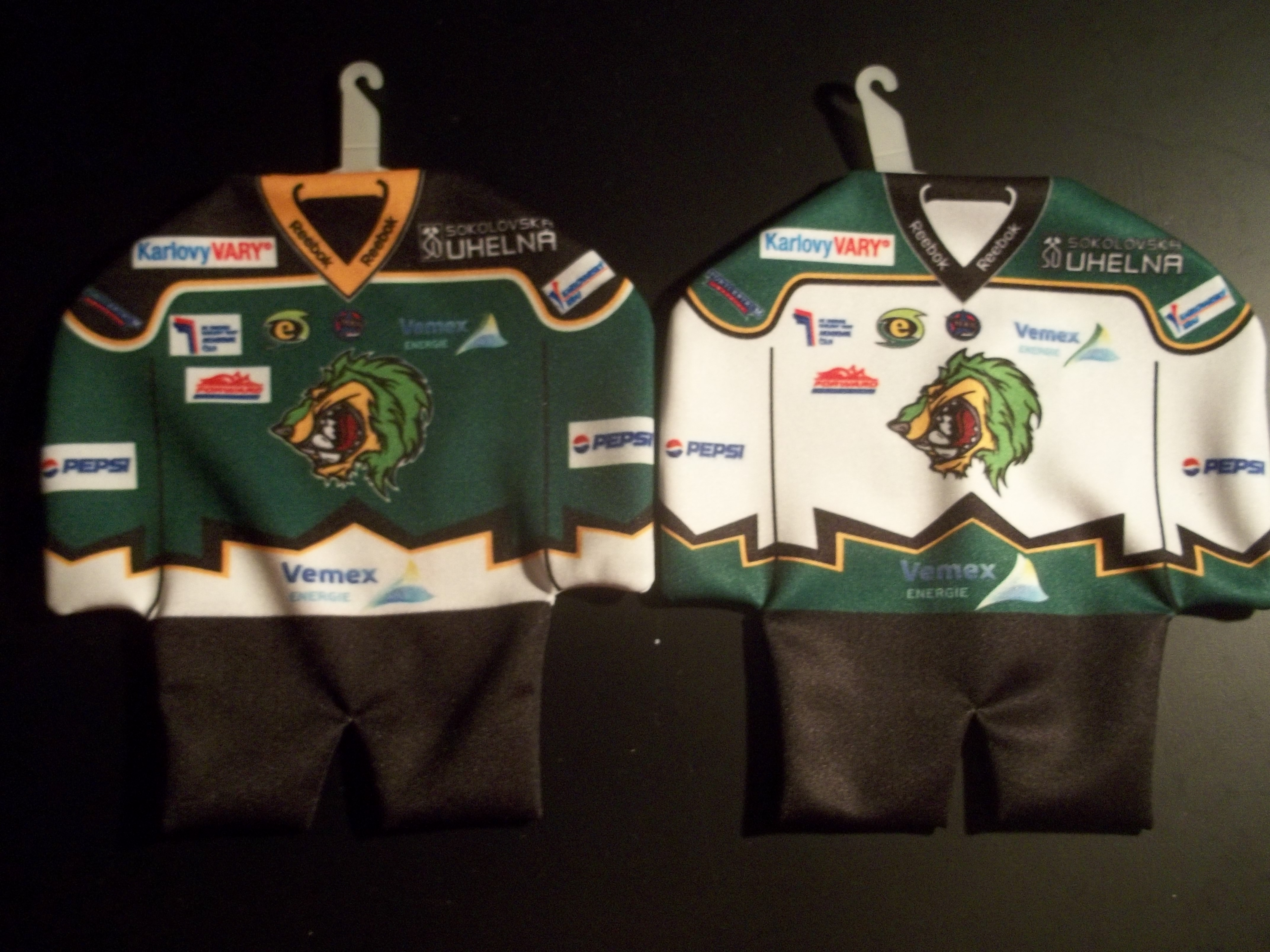 Vlčí smečka